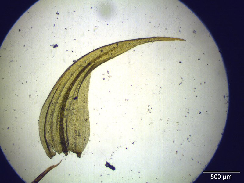 Bärlapp-Sichelmoos (Drepanocladus lycopodioides), Blatt, Vergrößerung: 40x